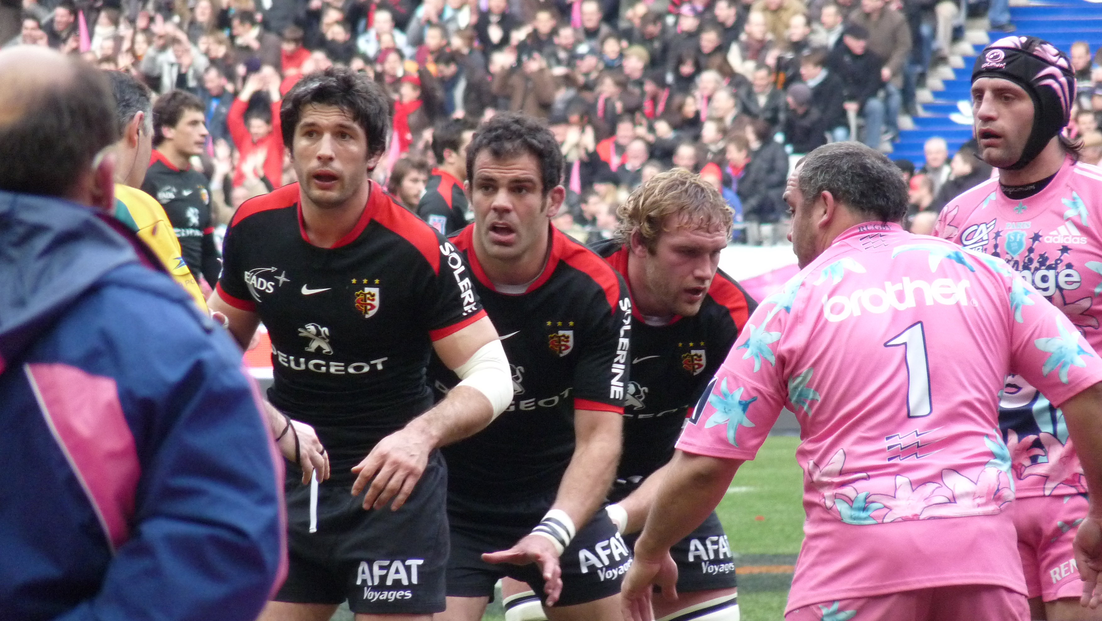 Match rugby Stade français vs Stade toulousain - 6 March 2010, Stade de France.